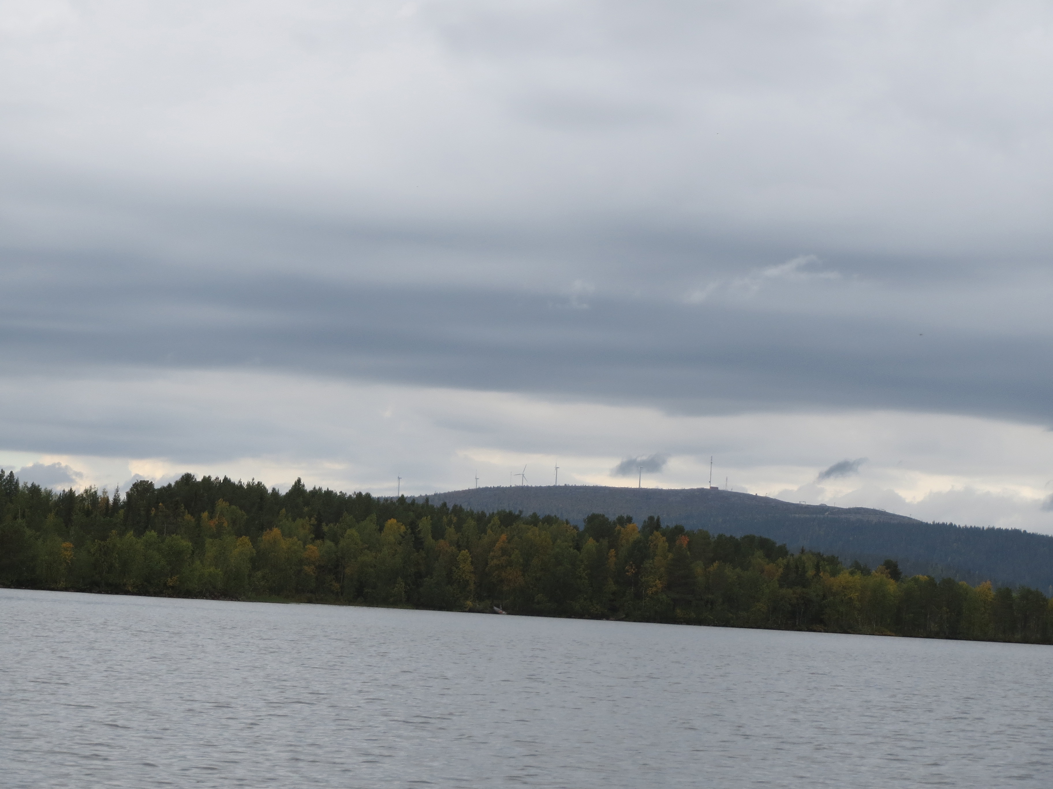 Olostunturi Särkijärveltä katsottuna